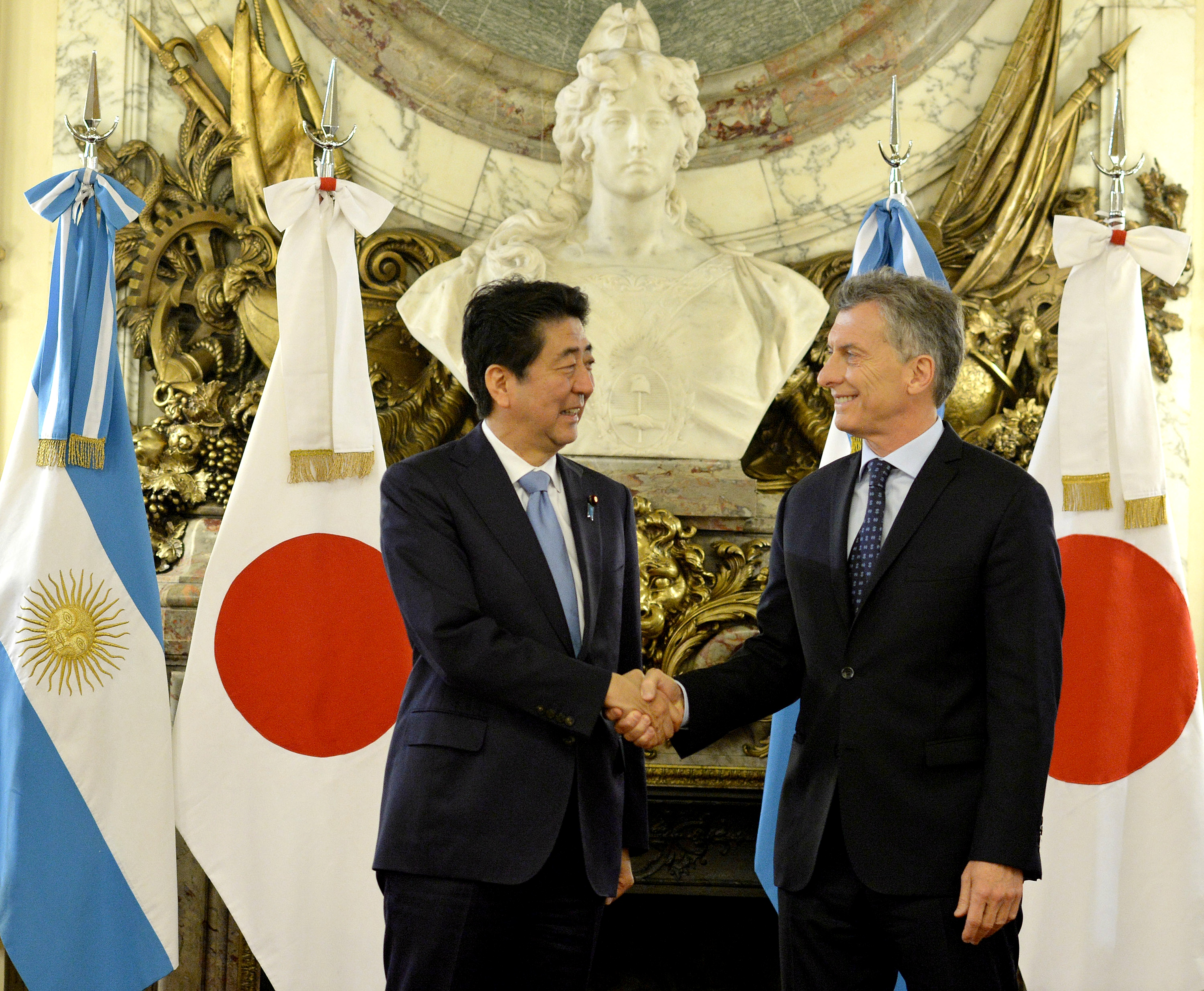 El presidente Mauricio Macri y el primer ministro Shinzo Abe abogaron en favor de construir "una alianza estratégica" entre la Argentina y Japón y se comprometieron a intensificar y a profundizar la relación bilateral, el intercambio comercial y el clima de inversiones.